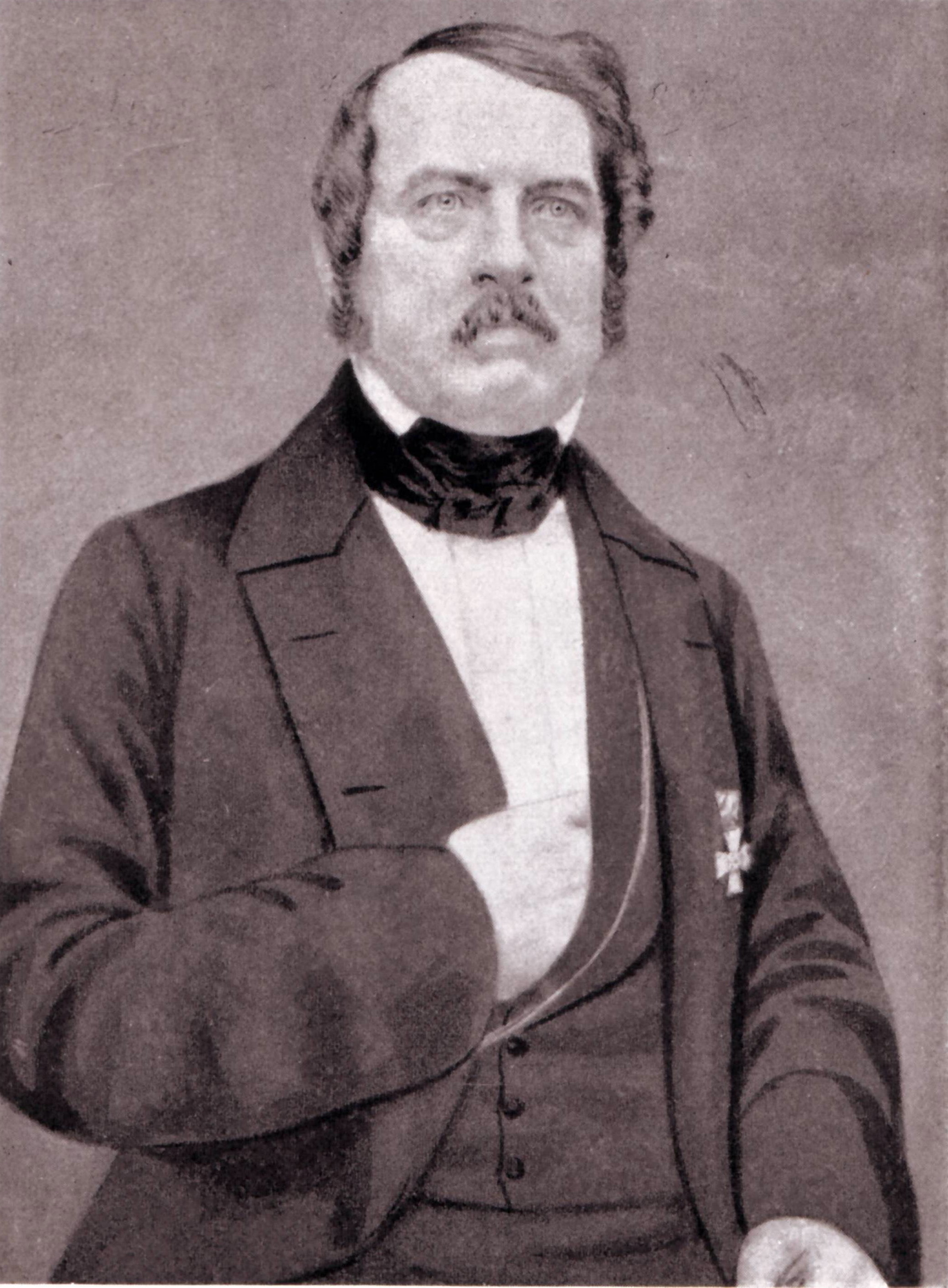 Portrait des preußischen Architekten Friedrich Louis Simon (1800-1877)